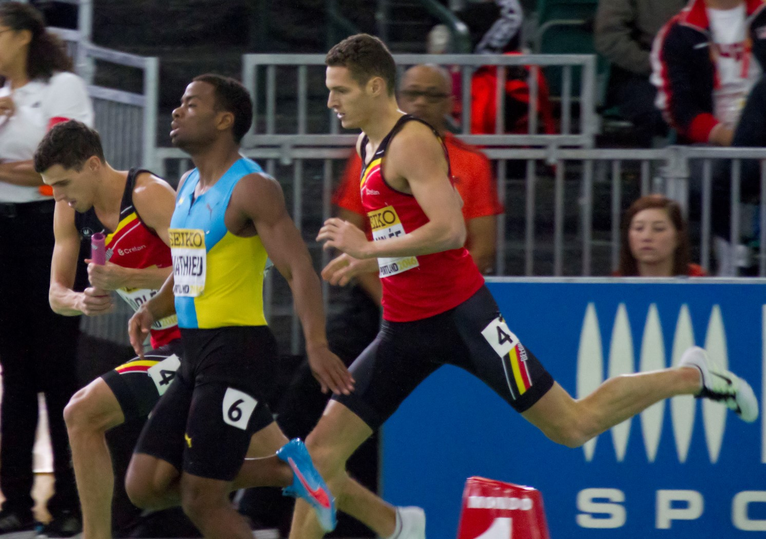 375 reeksen 4x400 dylan jonathan borlee